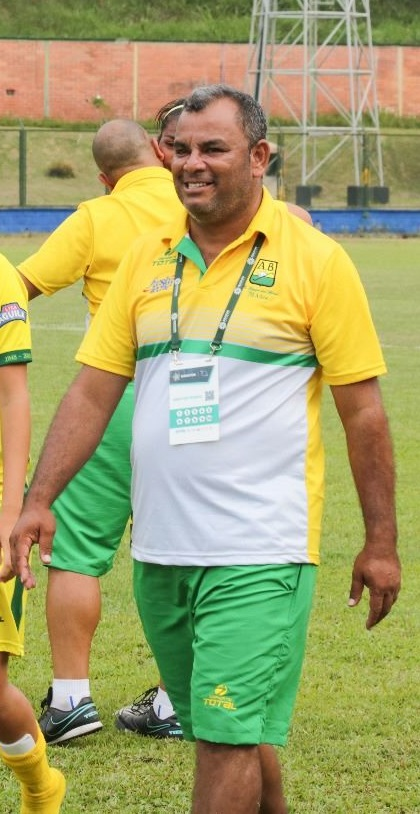 Expencer Uribe 2018